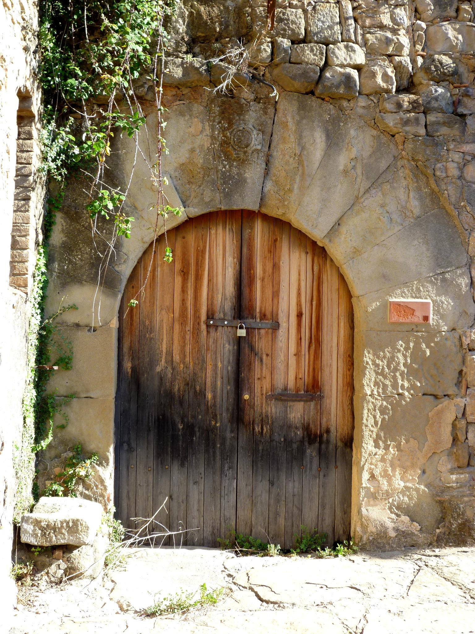 Mas Pujol de Planès (Montmajor) This is a a photo of a natural area in Catalonia, Spain, with id: ES510162